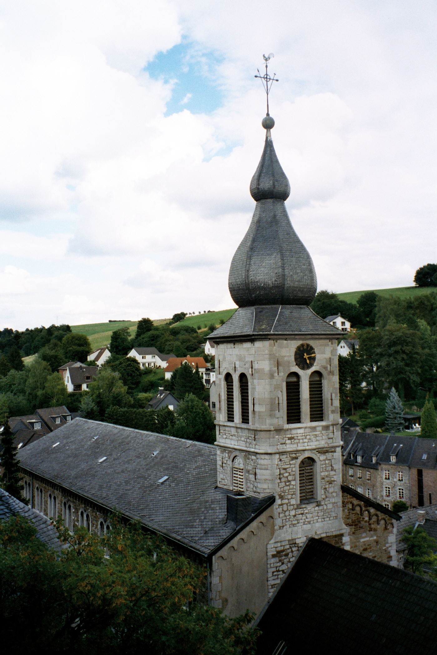 Stolberg_(Rhld.)_St._Lucia (Turm und Kirchenschiff von der Burggalerie)